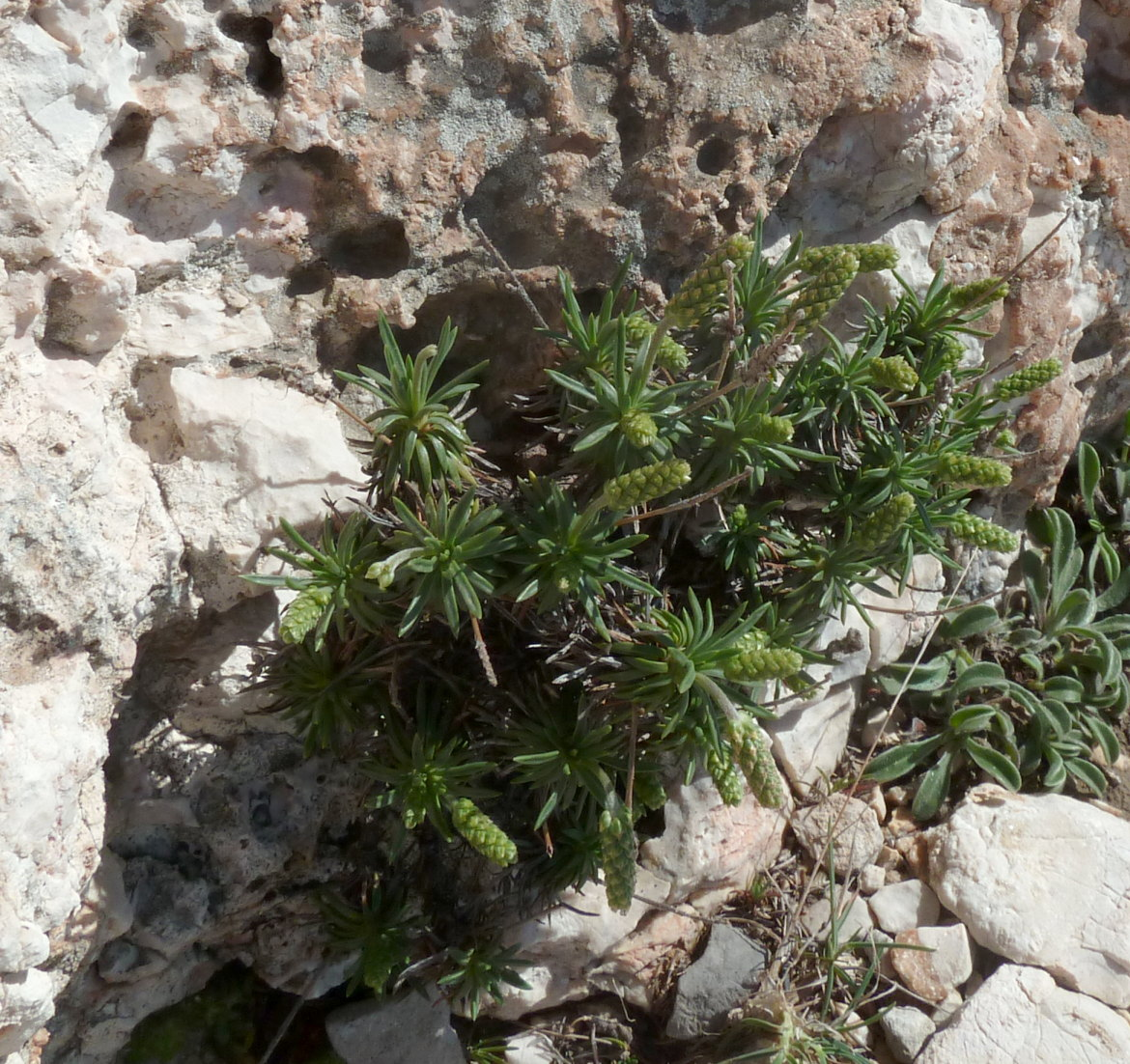 Plantago subulata, à Callelongue (Marseille, France)